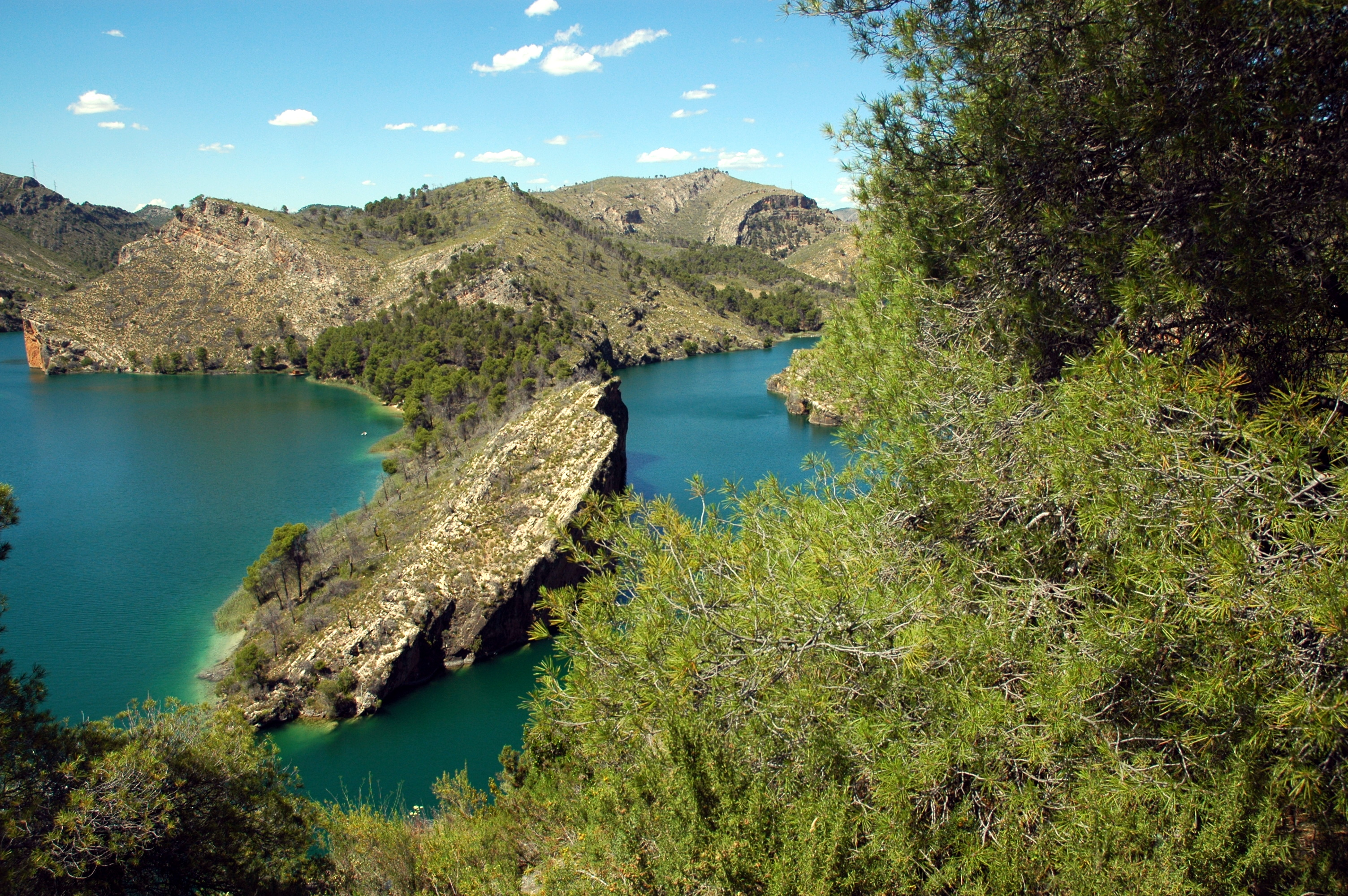 Zorita de los Canes, provincia de Guadalajara, España.